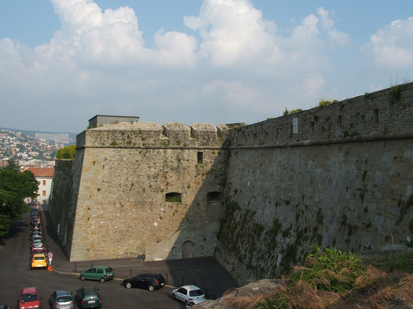 Immagine da Trieste - Castello di San Giusto.